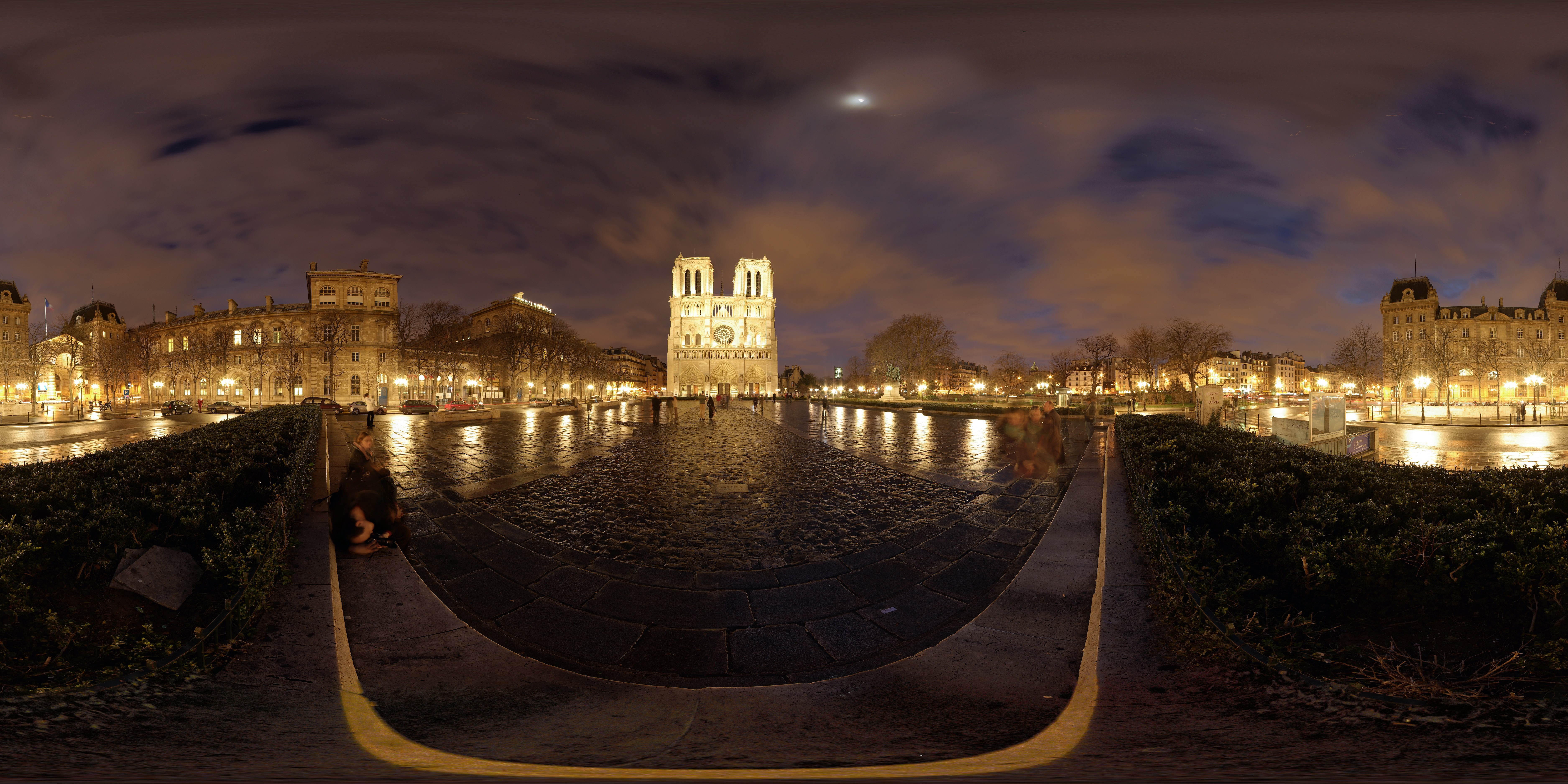 Notre-Dame de Paris